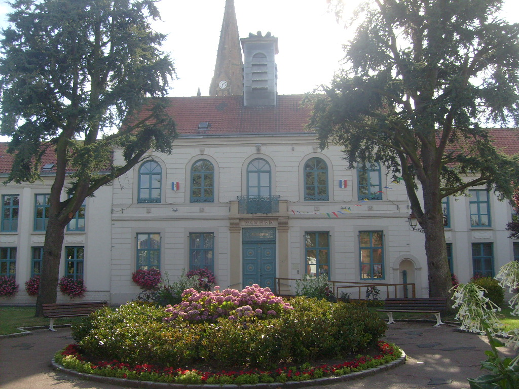 Mairie de Warhem